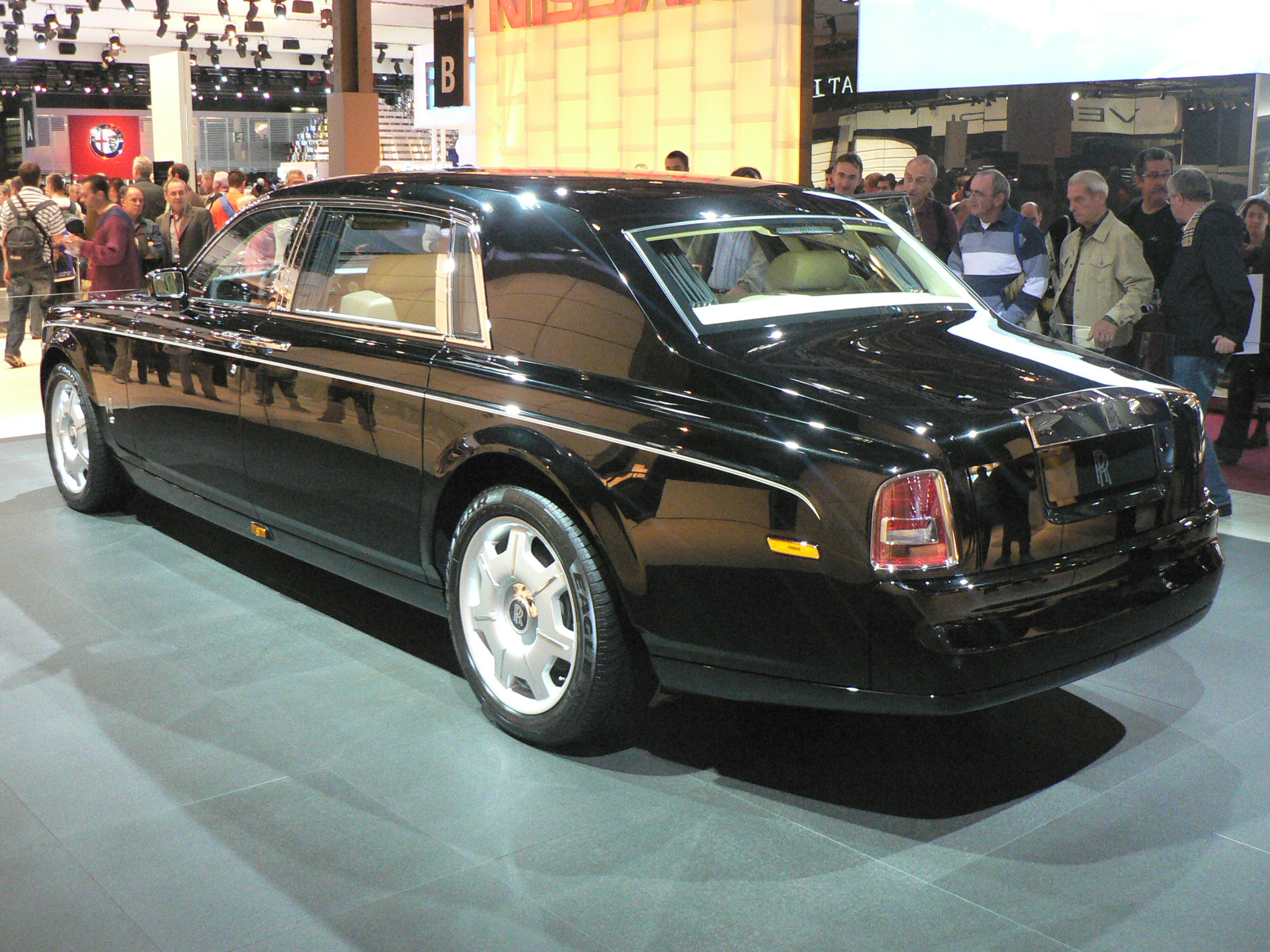 Mondial de l'automobile, Paris 2006